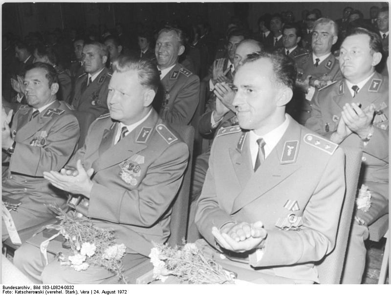 ADN-ZB Katscherowski 24.8.72 Berlin: Ehrung für Mitarbeiter und Kollektive der DDR-Zollverwaltung. Mit Auszeichnungen wurden am 24.8.72 anläßlich des 20. Jahrestages des sozialistischen Zollwesens Mitarbeiter und Kollektive der Zollverwaltung der DDR geehrt. Zolloberrat Rutsch und die Zollräte Mielitz und Pohlmann (v.r.n.l.) gehörten zu den Ausgezeichneten.